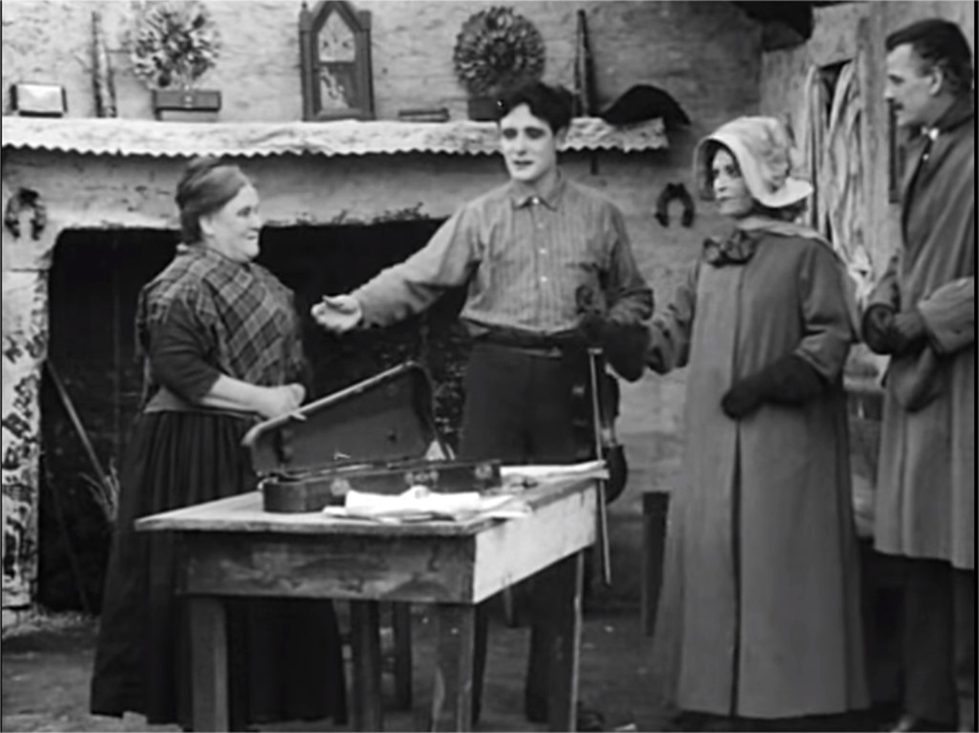 Anna Clark, Jack J. Clark, Gene Gauntier et J.P. McGowan dans "His Mother", réalisé par Sidney Olcott.